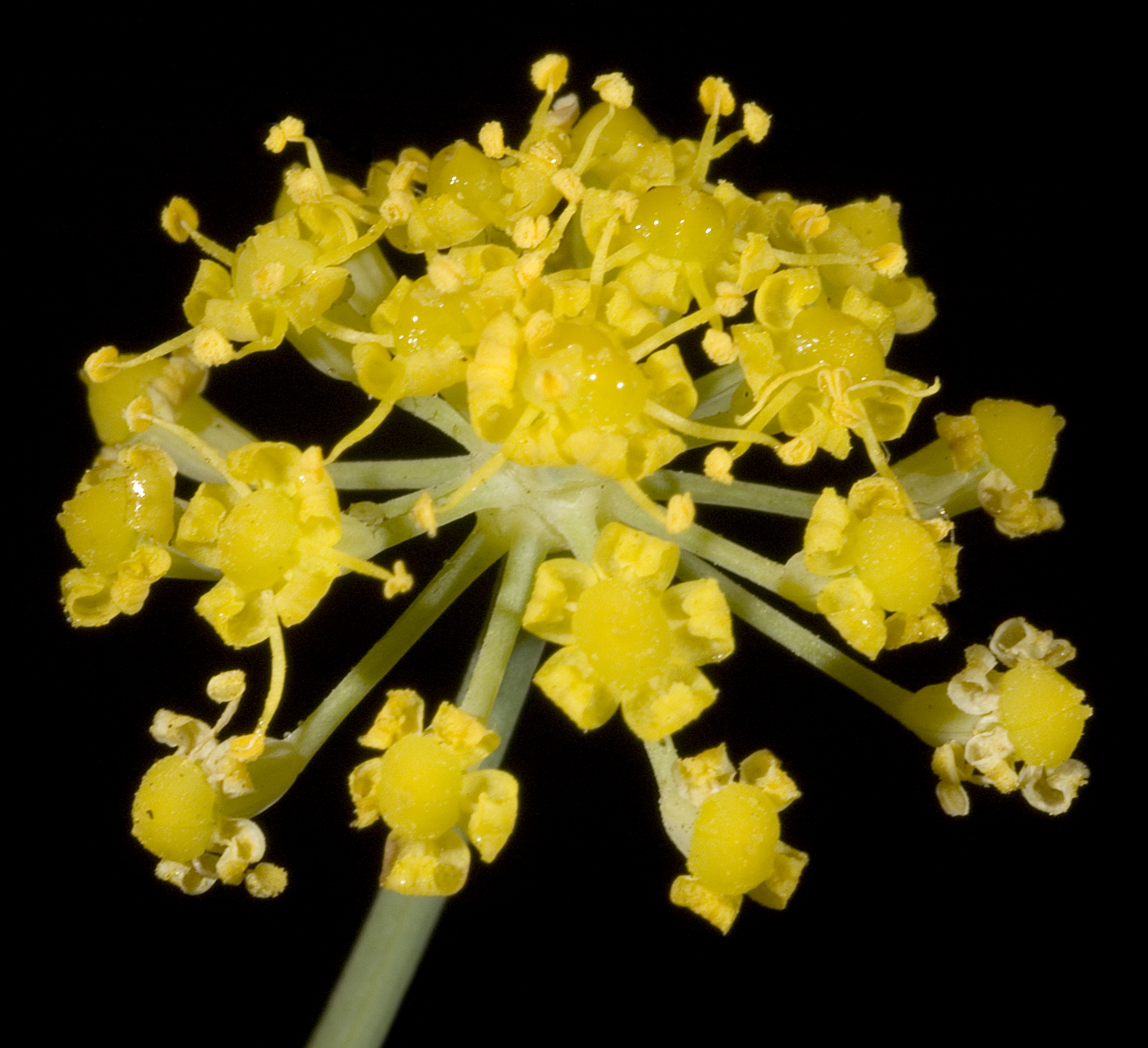 KRT3169